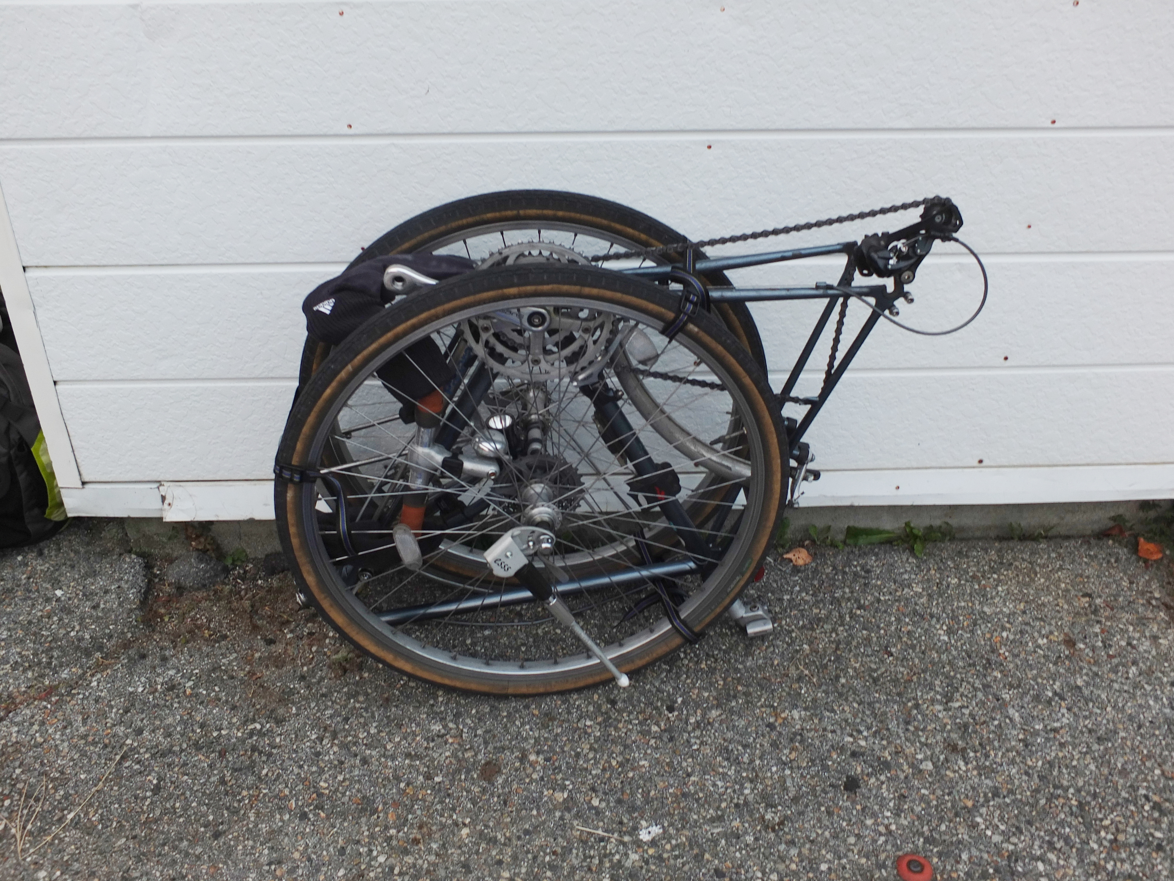 ランドナーをフォーク抜き輪行する様子。大糸線・千国駅にて。